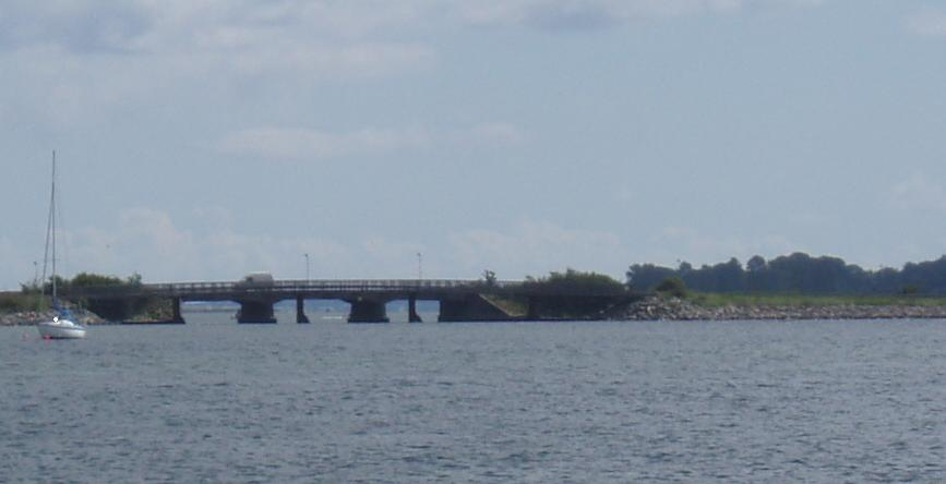 Broen og dæmningen fra Fyn til Thurø.